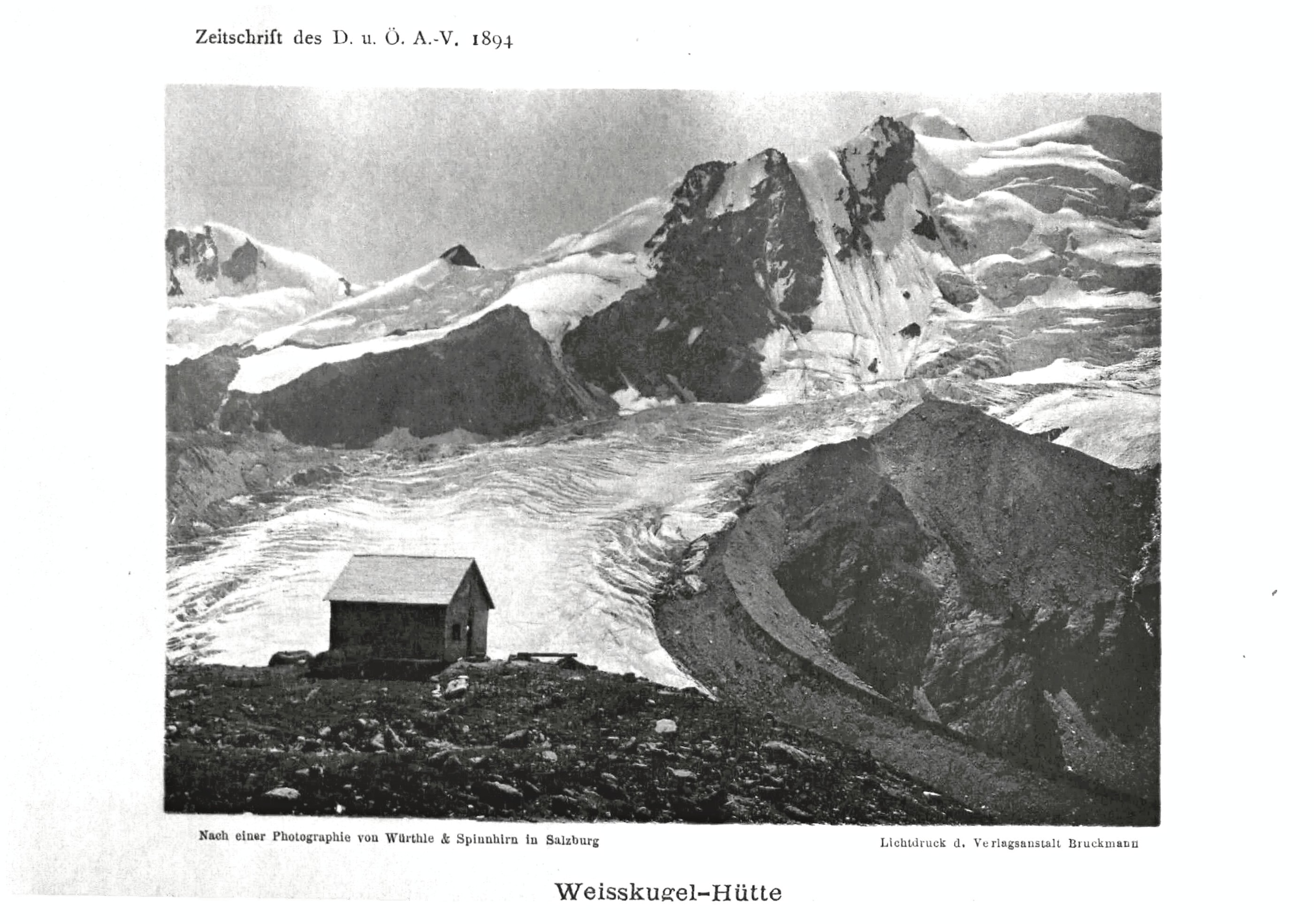 Weisskugel-Hütte aus Zeitschrift des Deutschen und Oesterreichischen Alpenvereins 1894 Band 25